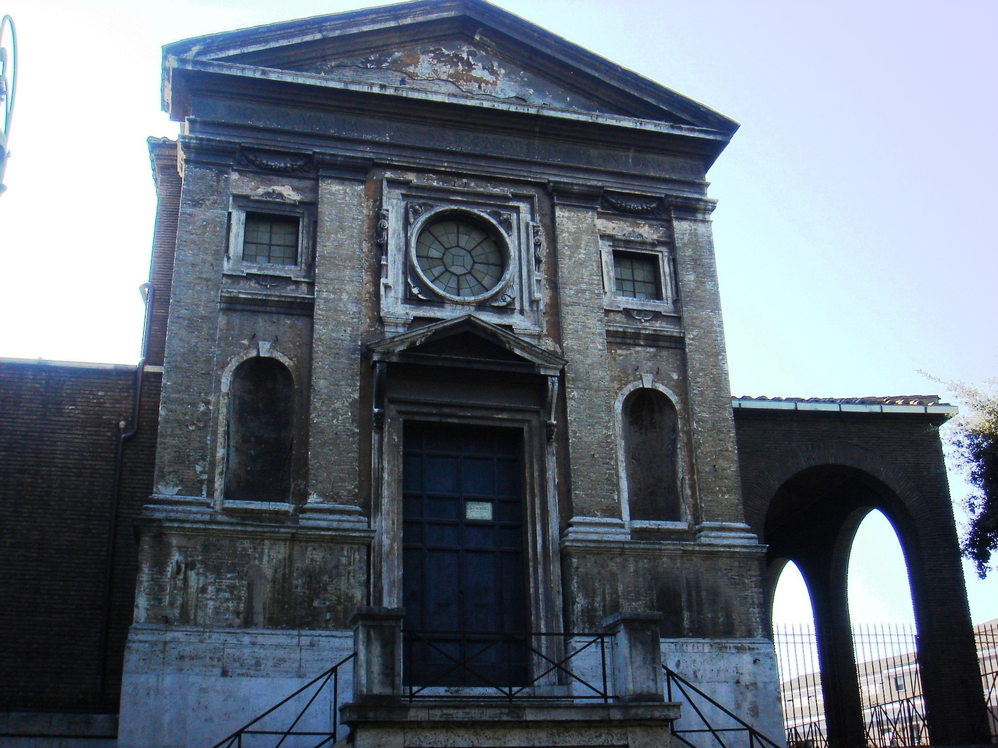 Roma, Sant'Omobono